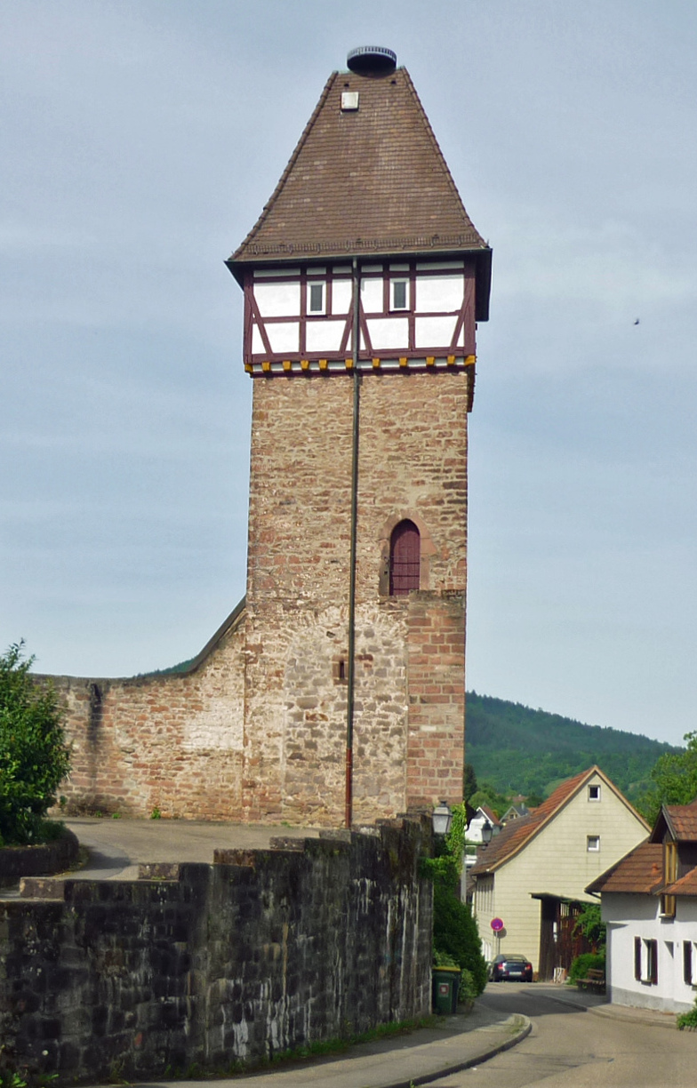 Storchenturm in Gernsbach im Murgtal, Lkr. Rastatt (Baden)